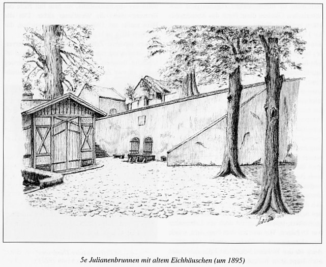 Der Guntersblumer Julianenbrunnen in Rheinhessen (Deutschland)